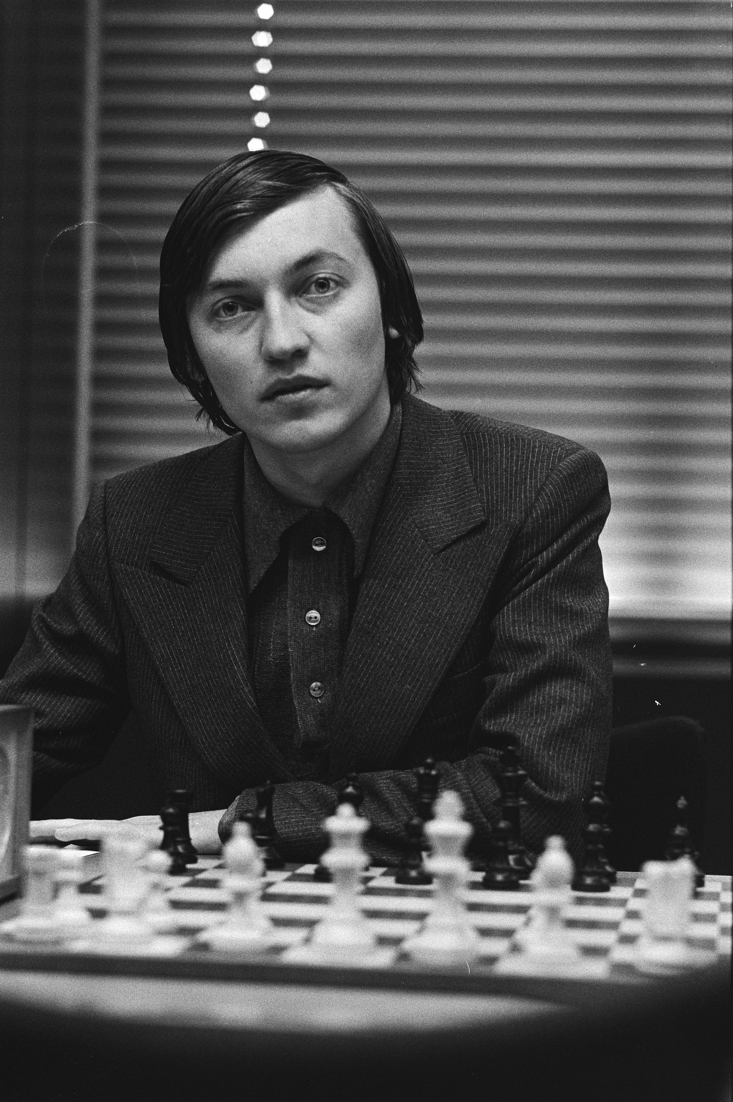 Collectie / Archief : Fotocollectie Anefo Reportage / Serie : Interpolis schaaktoernooi, Tilburg, 4e ronde Beschrijving : 4e Ronde, Anatoli Karpov achter het schaakbord Datum : 6 november 1979 Locatie : Noord-Brabant, Tilburg Trefwoorden : portretten, schaken, sport, wedstrijden Persoonsnaam : Karpov, Anatoli Fotograaf : Croes, Rob C. / Anefo Auteursrechthebbende : Nationaal Archief Materiaalsoort : Negatief (zwart/wit) Nummer archiefinventaris : bekijk toegang 2.24.01.05 Bestanddeelnummer : 930-5266